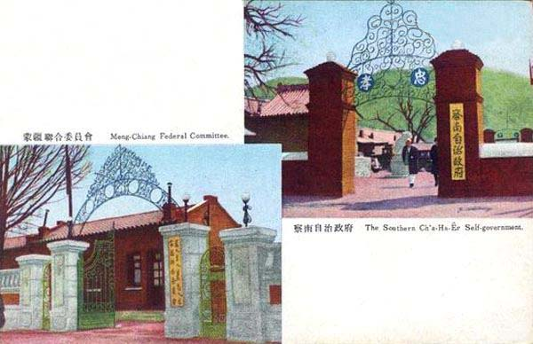 察南自治政府及蒙疆联合委员会